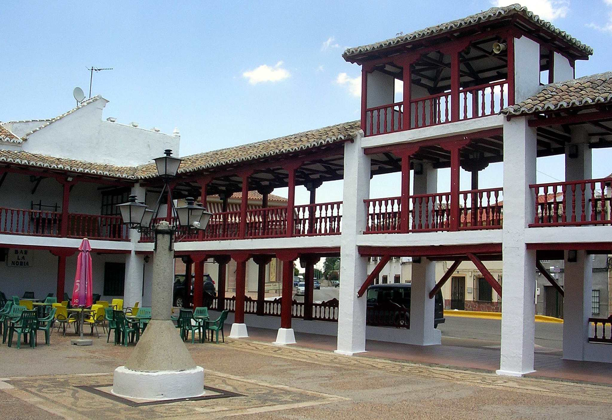 Puerto Lapice, place du village (plaza del pueblo)